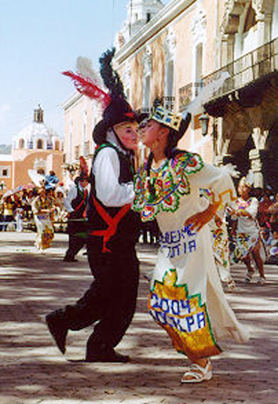 Vasarios de Papalotla.